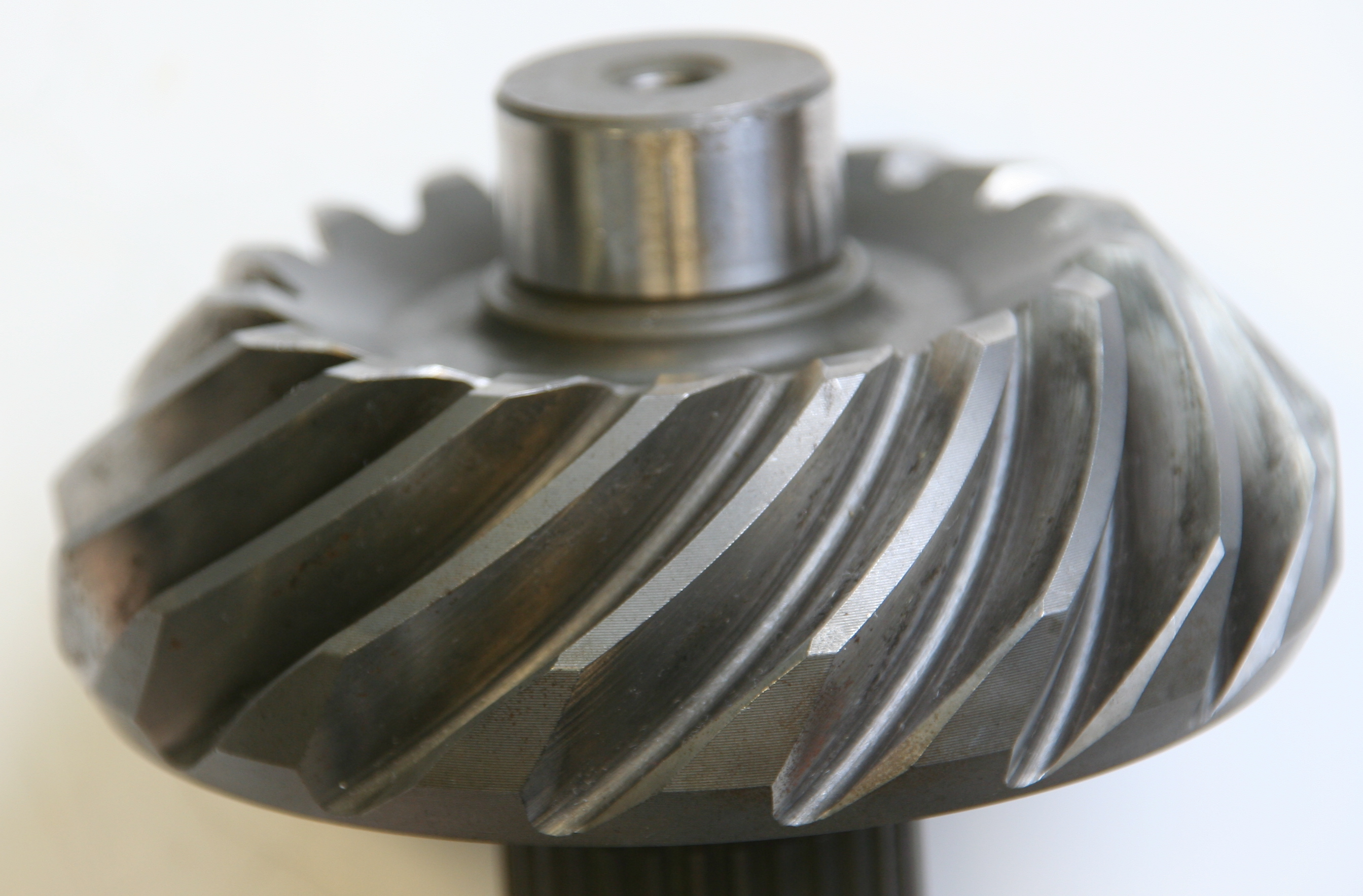 Bogenverzahntes Antriebsritzel. Dieses Zahnrad treibt ein bogenverzahntes Kegelrad an und bildet damit einen Hypoidantrieb